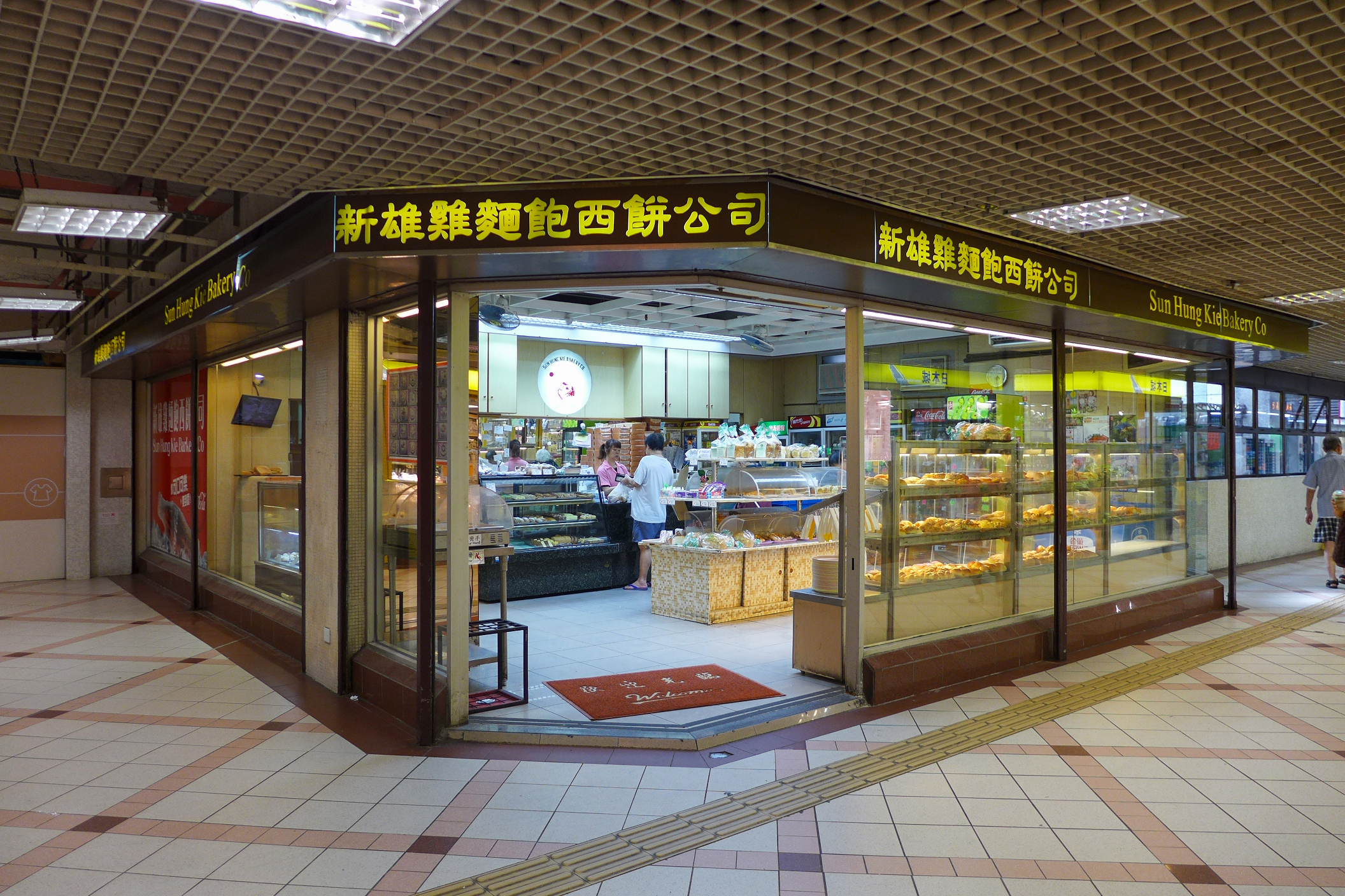 Sun Hung Kie Bakery Company in Lok Wah Estate